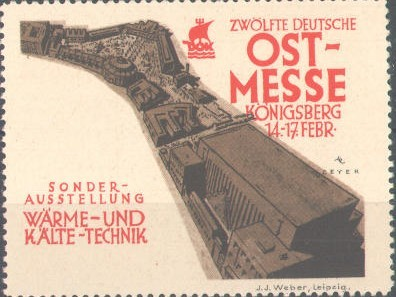 12. Deutsche Ostmesse Königsberg